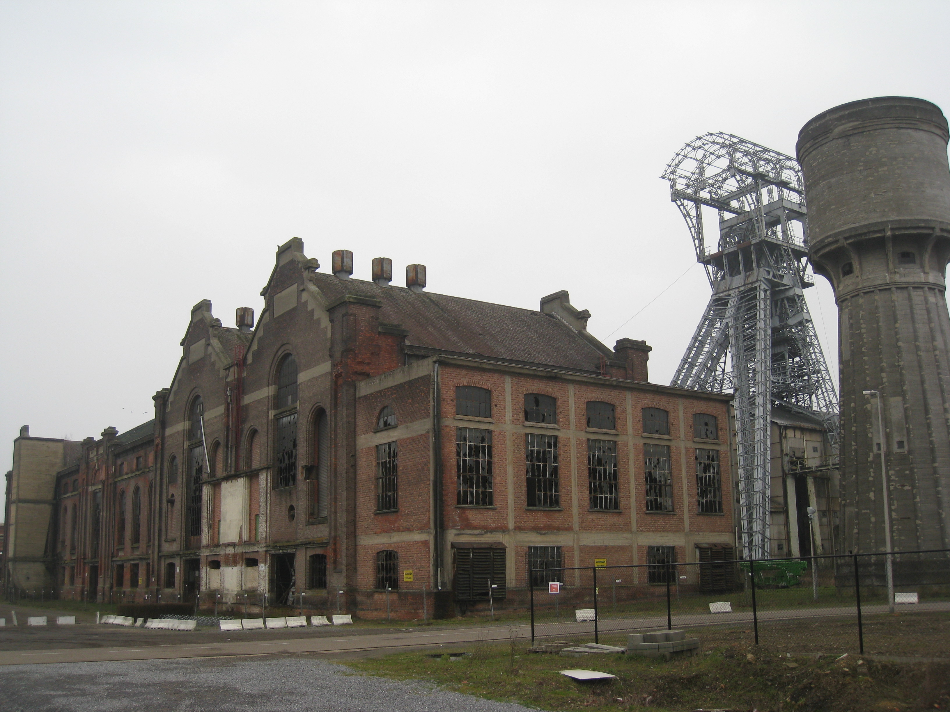 Ophaalmachinegebouw, kolenmijn Heusden-Zolder